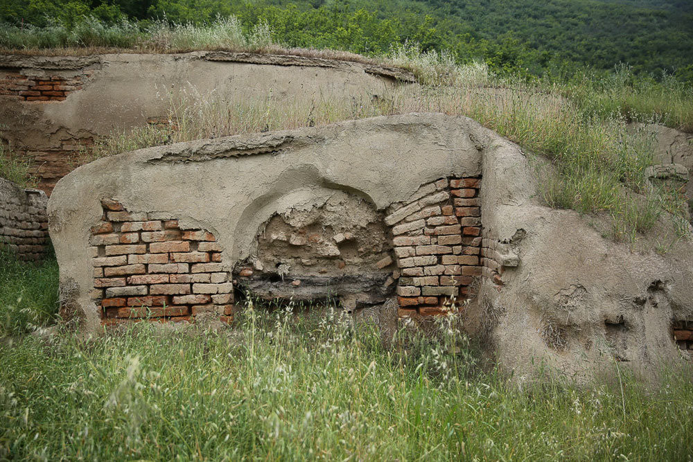 دیوار بزرگ اسکندر یا دیوار سرخ که در متون قدیمی با نام مار سرخ نیز نامیده‌شده‌است ، دیواری تاریخی است که از کنار دریای خزر در ناحیه گمیشان آغاز شده و تا کوه‌های گلیداغ در شمال شرق کلاله ادامه می‌یافته‌است. هم‌اکنون تقریباً تمام این دیوار از میان رفته‌است و تنها بخش‌های کوچکی از آن که در زیر خاک مدفون مانده، باقی است. دیوار تاریخی گرگان پس از دیوار چین (به طول شش هزار کیلومتر) ، بزرگترین دیوار دفاعی جهان است. این دیوار عظیم تاریخی که ۲۰۰ کیلومتر طول دارد در ۲۹ تیرماه سال ۱۳۷۸ به ثبت ملی رسیده‌است.